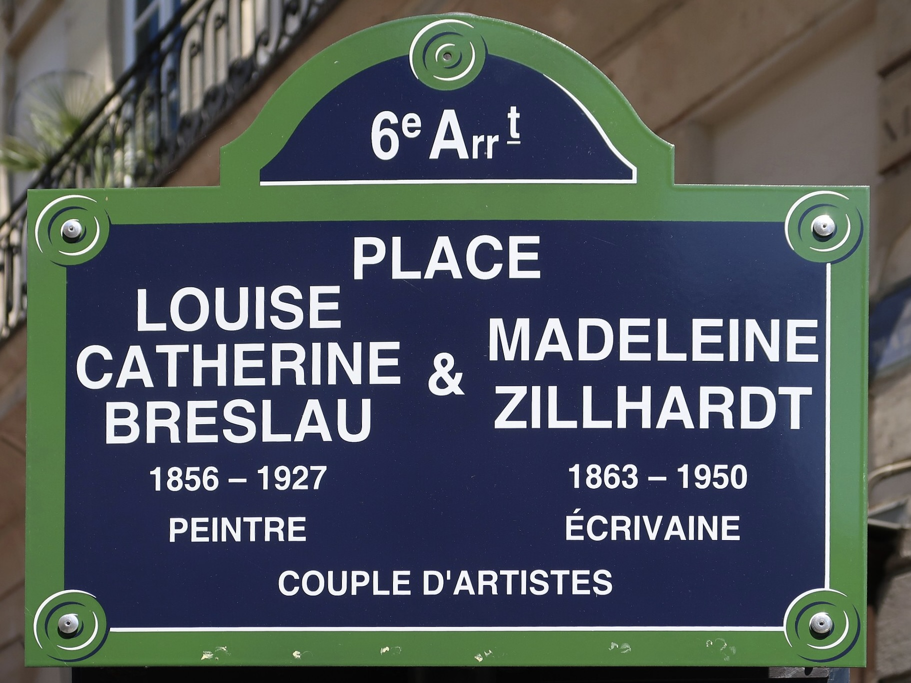 Plaque de la place Louise-Catherine-Breslau-et-Madeleine-Zillhardt, au croisement de la rue Mazarine et de la rue Saint-André-des-Arts, de la rue de l'Ancienne-Comédie et de la rue de Buci (Paris, 6e).